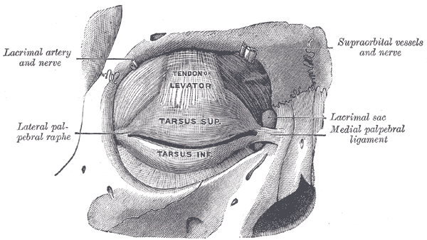 Gravure nº894 représentant les tarses et leurs ligaments.